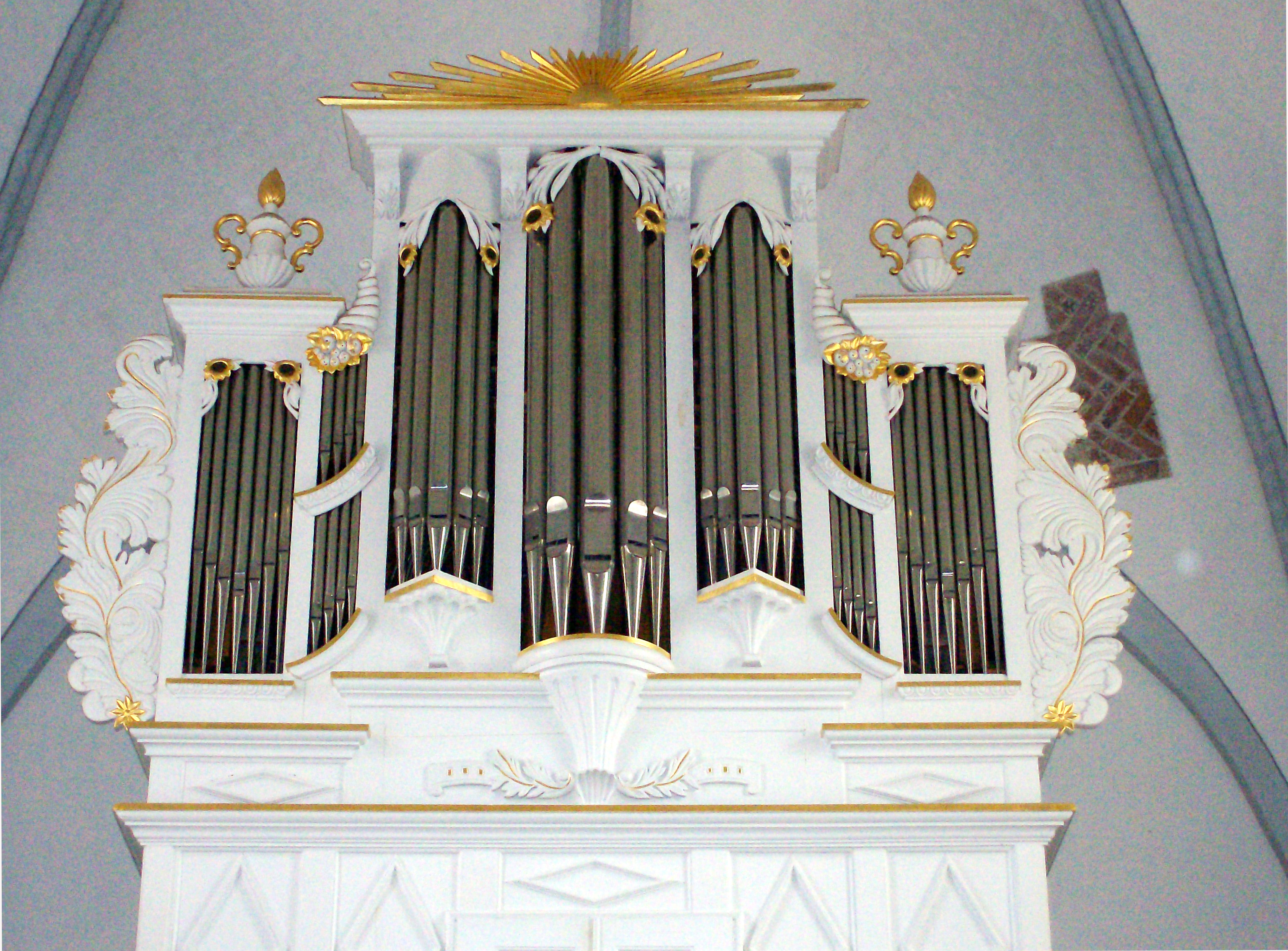 Orgel Stapelmoor